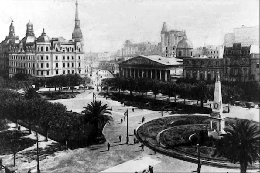 Postal de Buenos Aires. La Plaza de Mayo vista desde Defensa e Hipólito Yrigoyen hacia el noroeste. De izquierda a derecha de ven: el Palacio Municipal recién ampliado, la primera cuadra de la Diagonal Norte (aún sin edificar), la Catedral Metropolitana, el edificio de la Curia (incendiado en 1955), un edificio vecino de oficinas y parte de la fachada del antiguo edificio del Nuevo Banco Italiano. Detrás, se distingue la torre-faro de la Galería General Güemes.